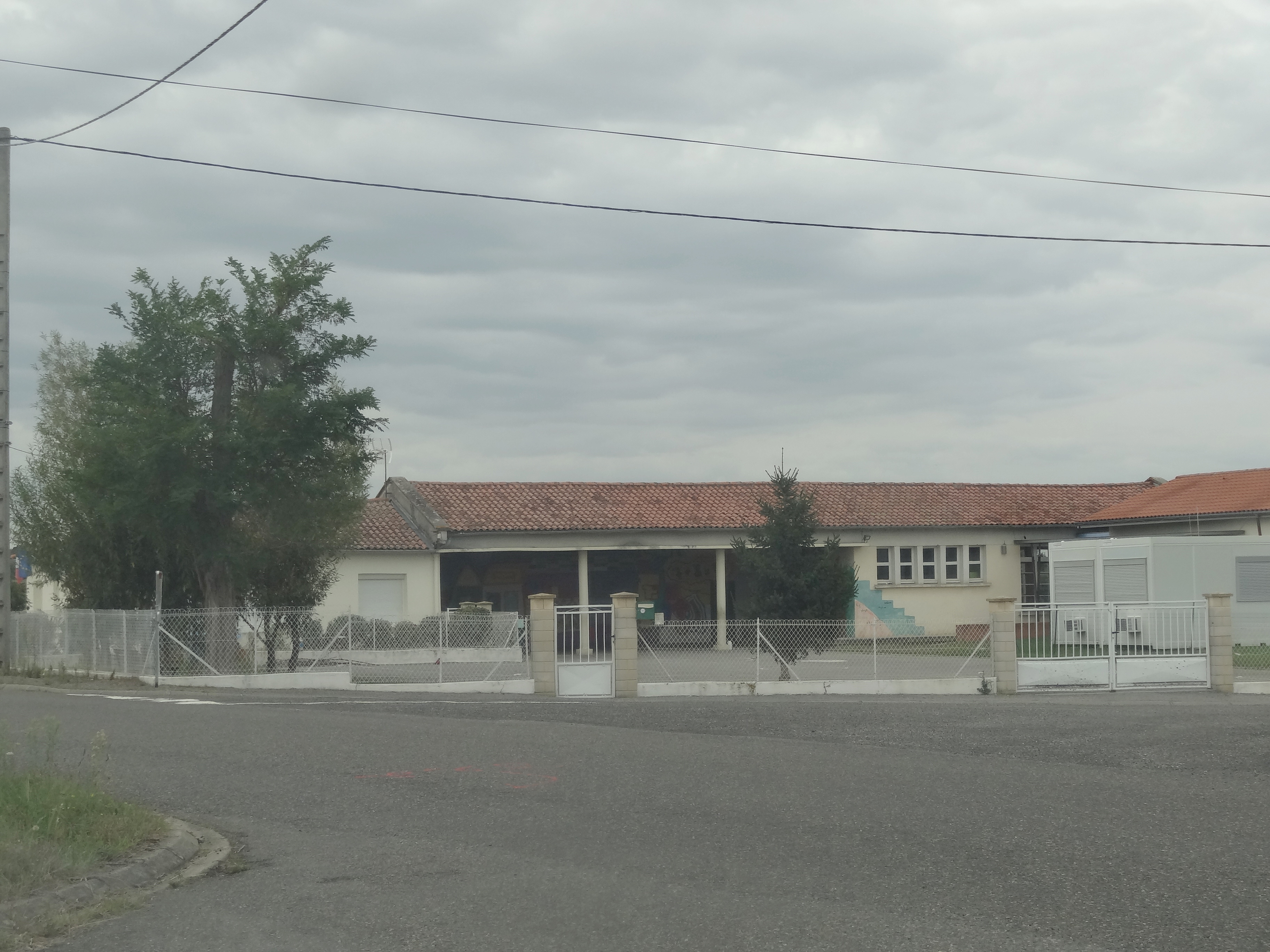 Mairie et école de Manas-Bastanous.